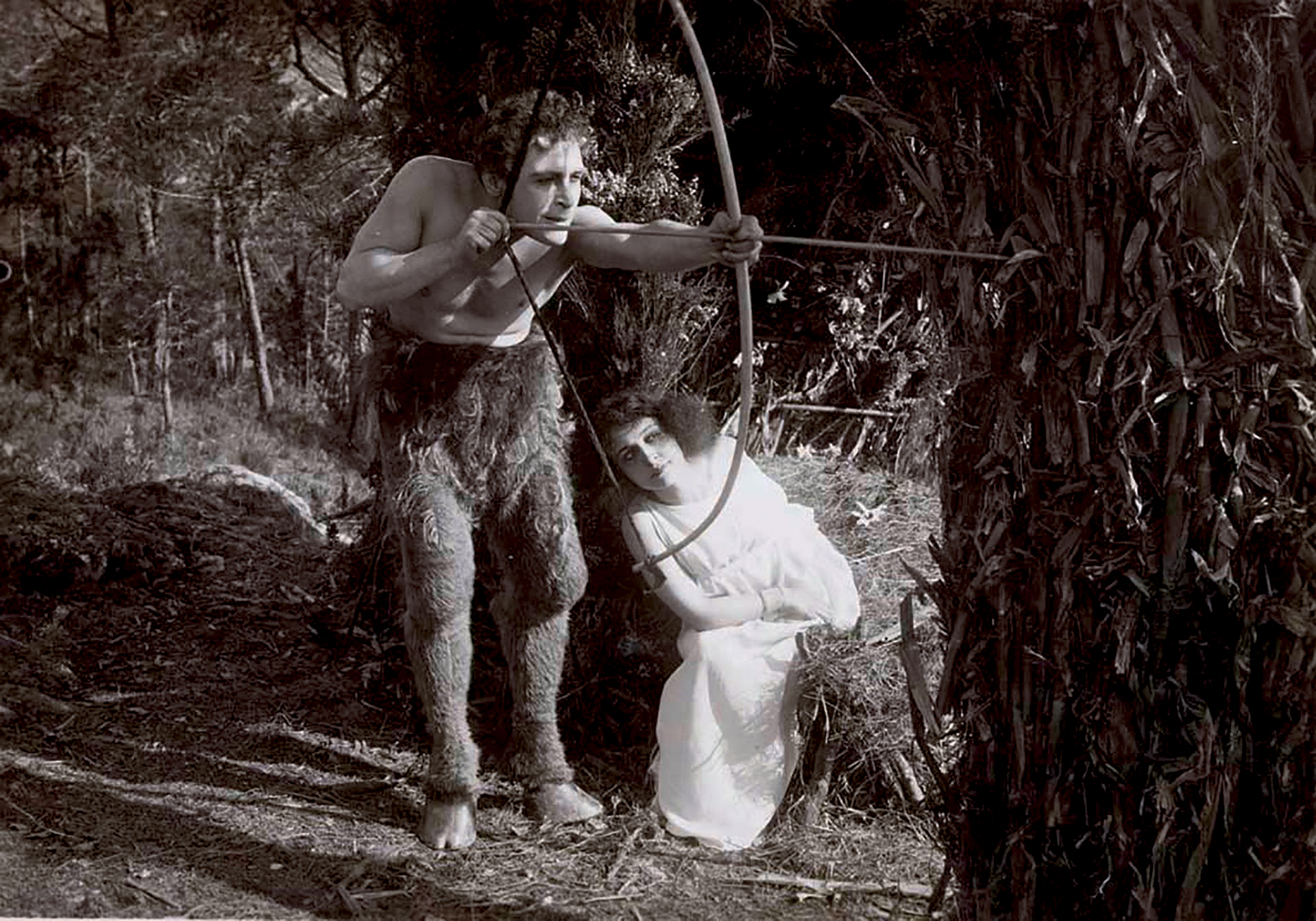 Film still of Febo Mari in Il Fauno, an Italian silent film